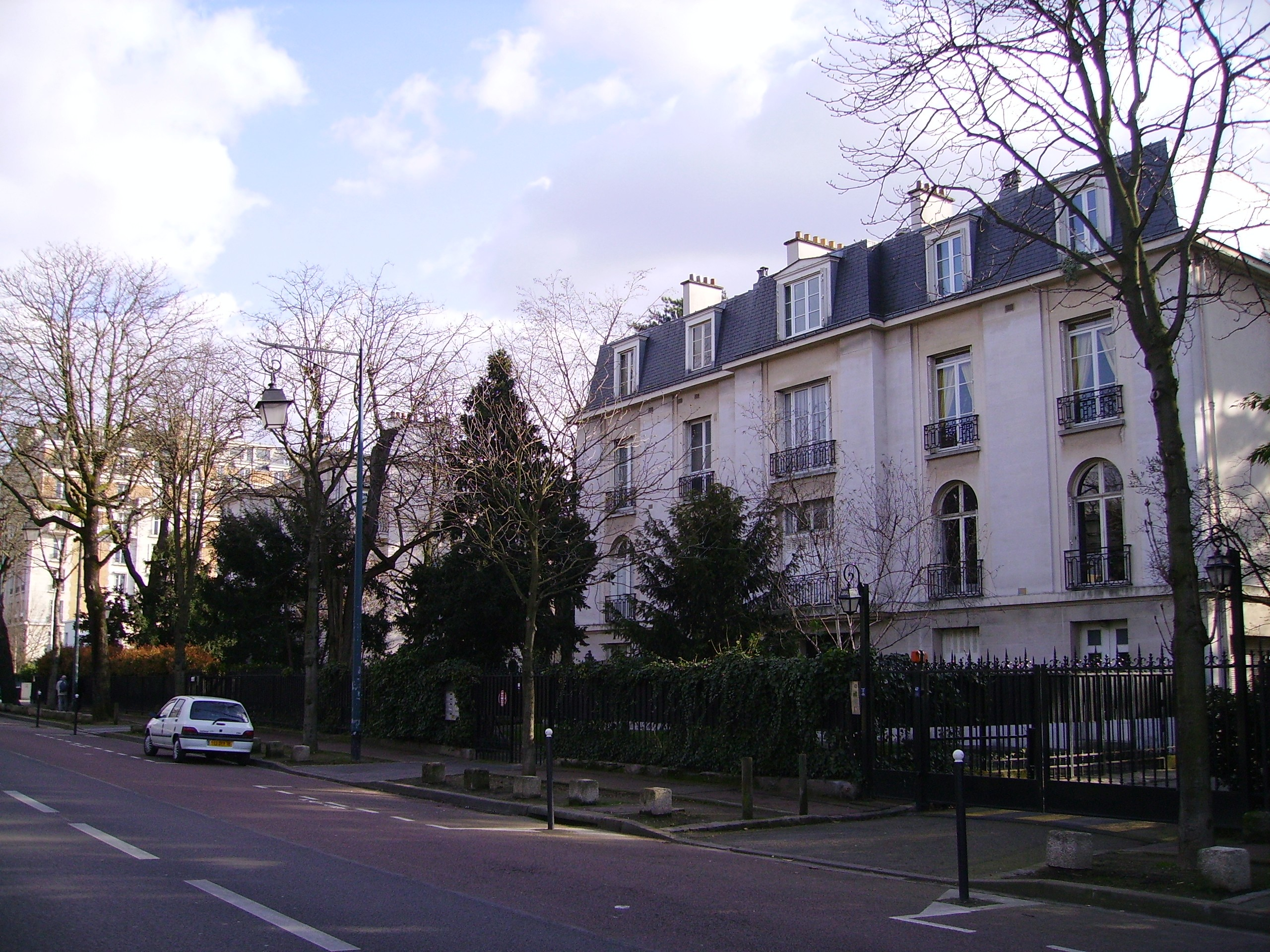 L'élégant boulevard d'Auteuil à Boulogne-Billancourt (92), en lisière du bois de Boulogne.